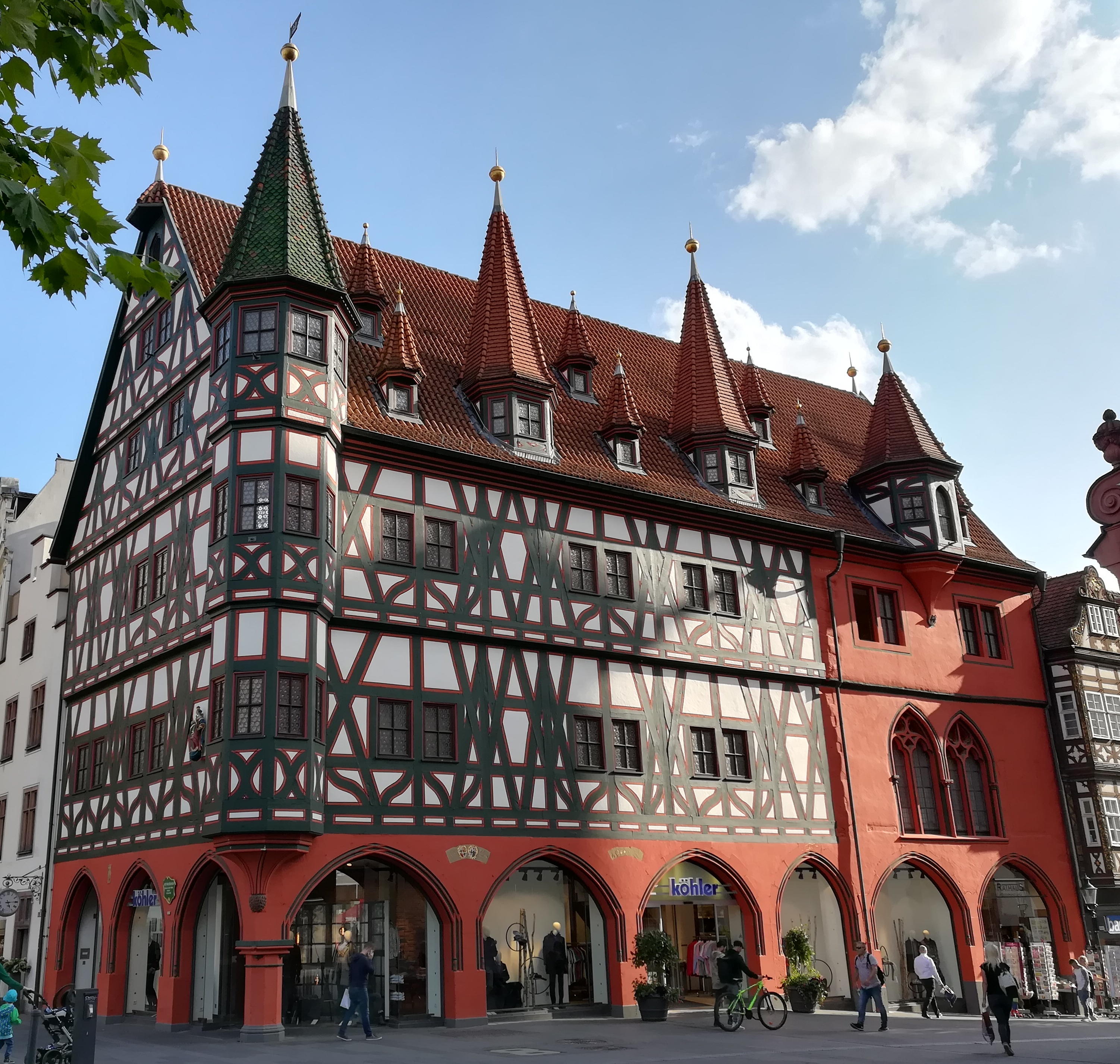 Altes Rathaus Fulda in August 2018